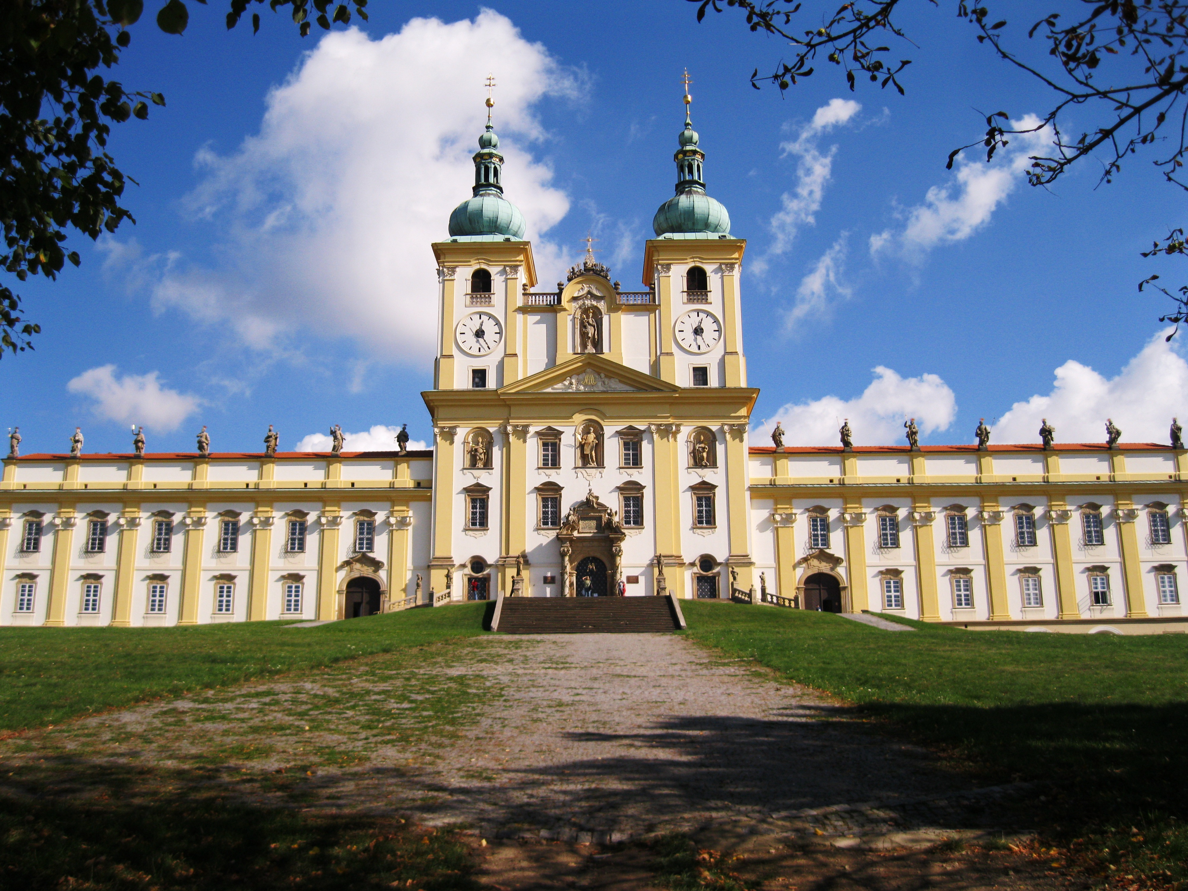 Kostel Navštívení P. Marie (Svatý Kopeček), Svatý Kopeček